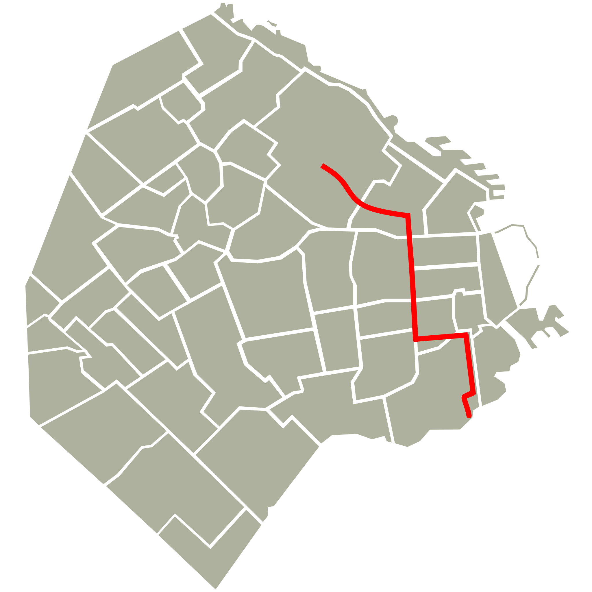 Recorrido Línea 12 (Buenos Aires)